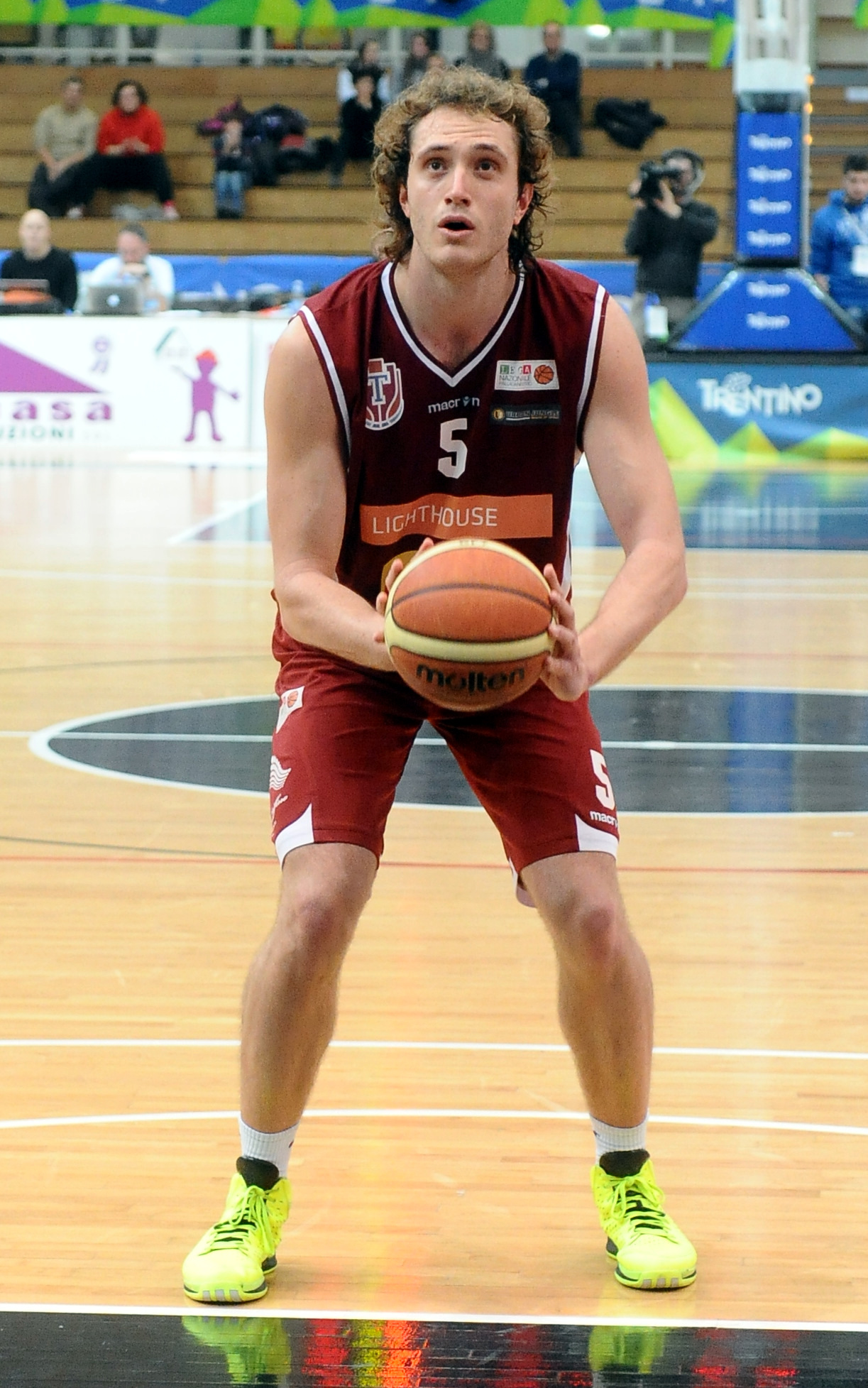 Andrea Renzi durante una partita della Pallacanestro Trapani contro l'Aquila Basket Trento.